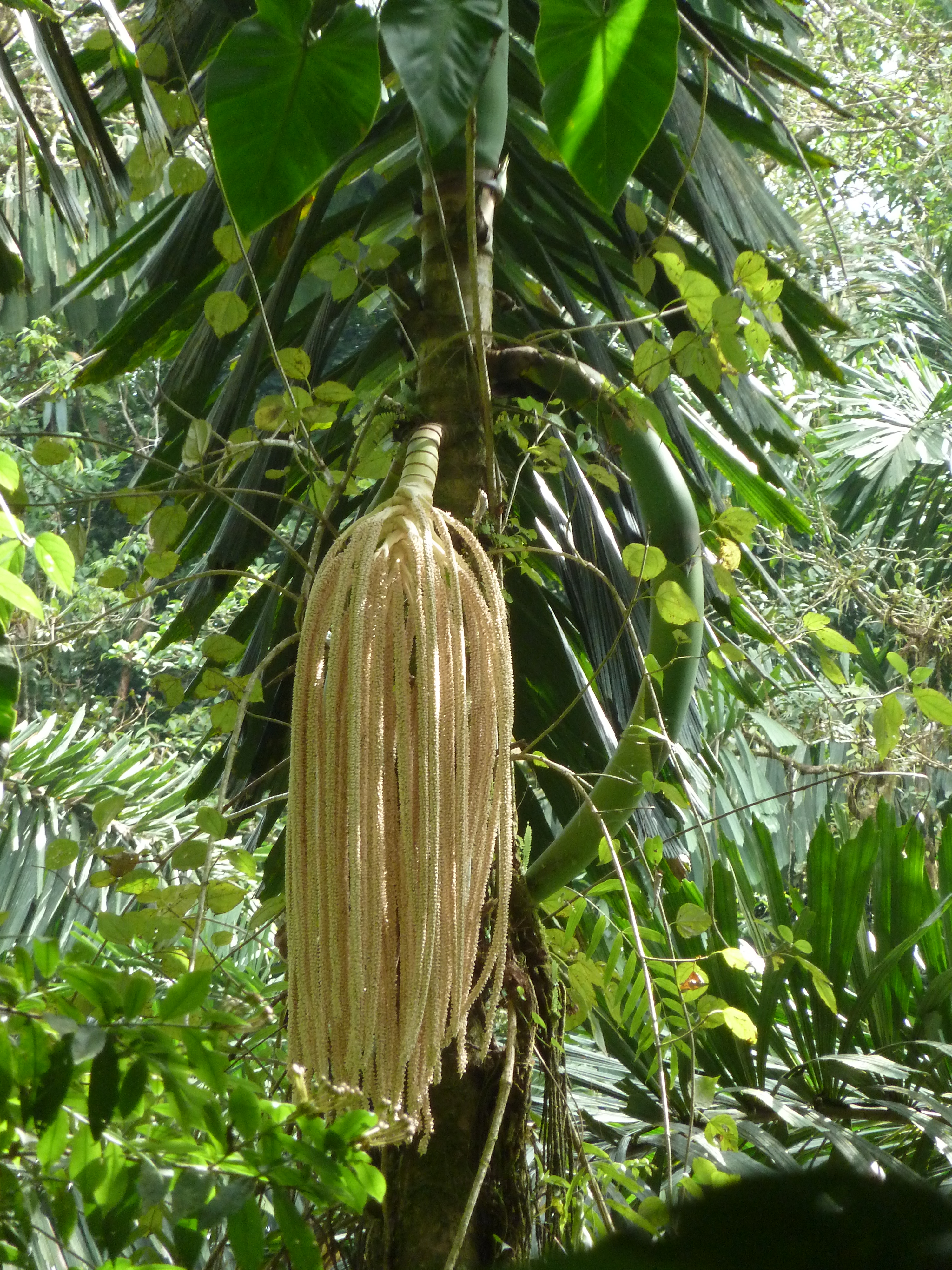 détail de l'inflorescence - I. deltoidea dans foret primaire du Costa-Rica